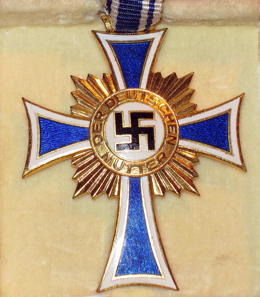 Tysk moderkors i gull